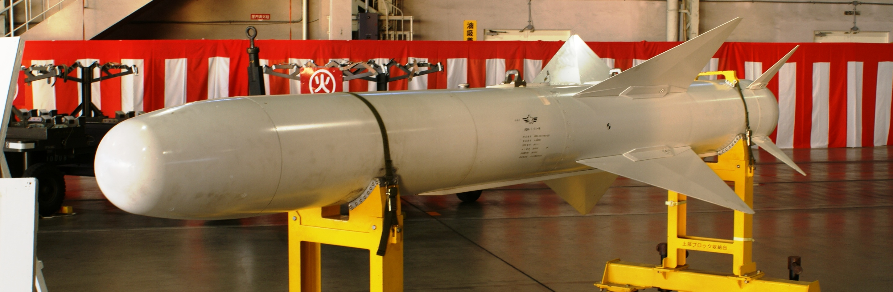 新田原基地で撮影